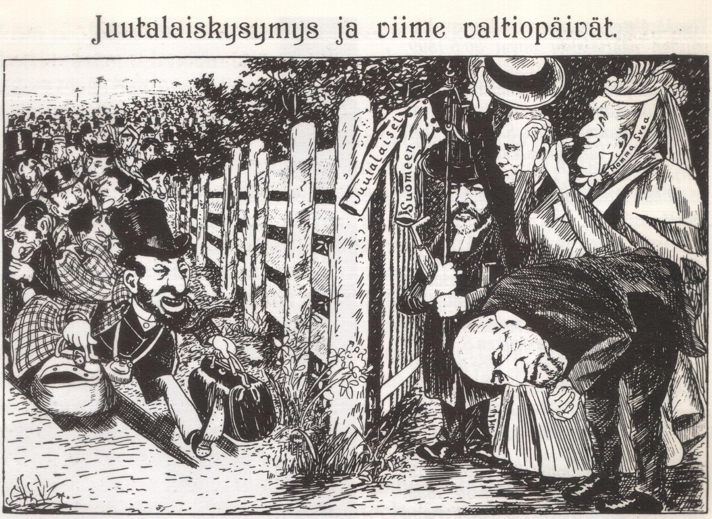 Pilapirtäjän näkemys siitä, mitä olisi tapahtunut, jos Suomen säädyt olisivat päättäneet kumota juutalaisten maahantulokiellon; vasemmalla stereotyyppisesti kuvattuja juutalaisia saapumassa Suomeen. Asiaa oli käsitelty vuoden 1897 valtiopäivillä. Piirros on ilmestynyt pilalehti Matti Meikäläisen numerossa 15/1897.